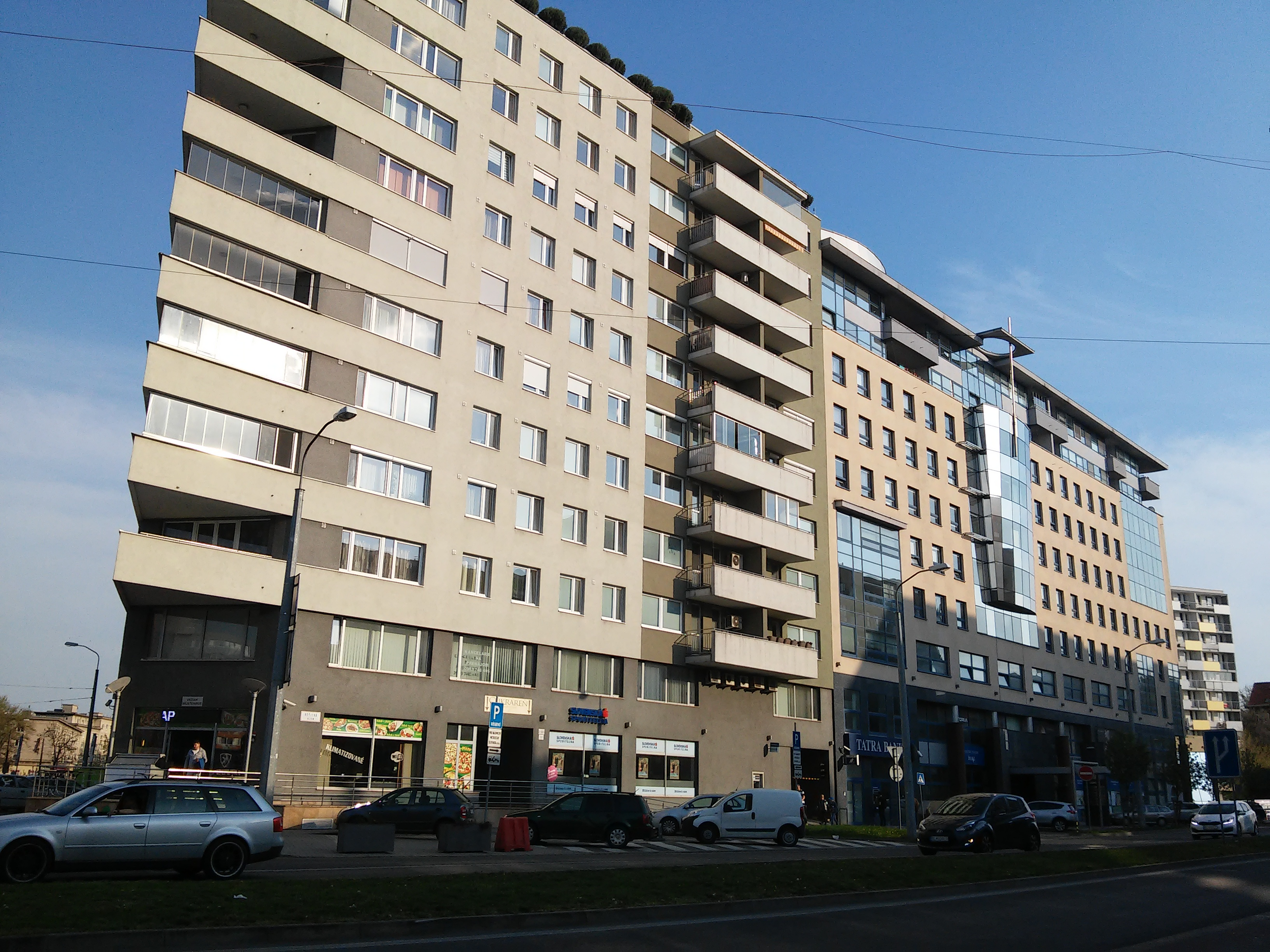 Košická, Bratislava